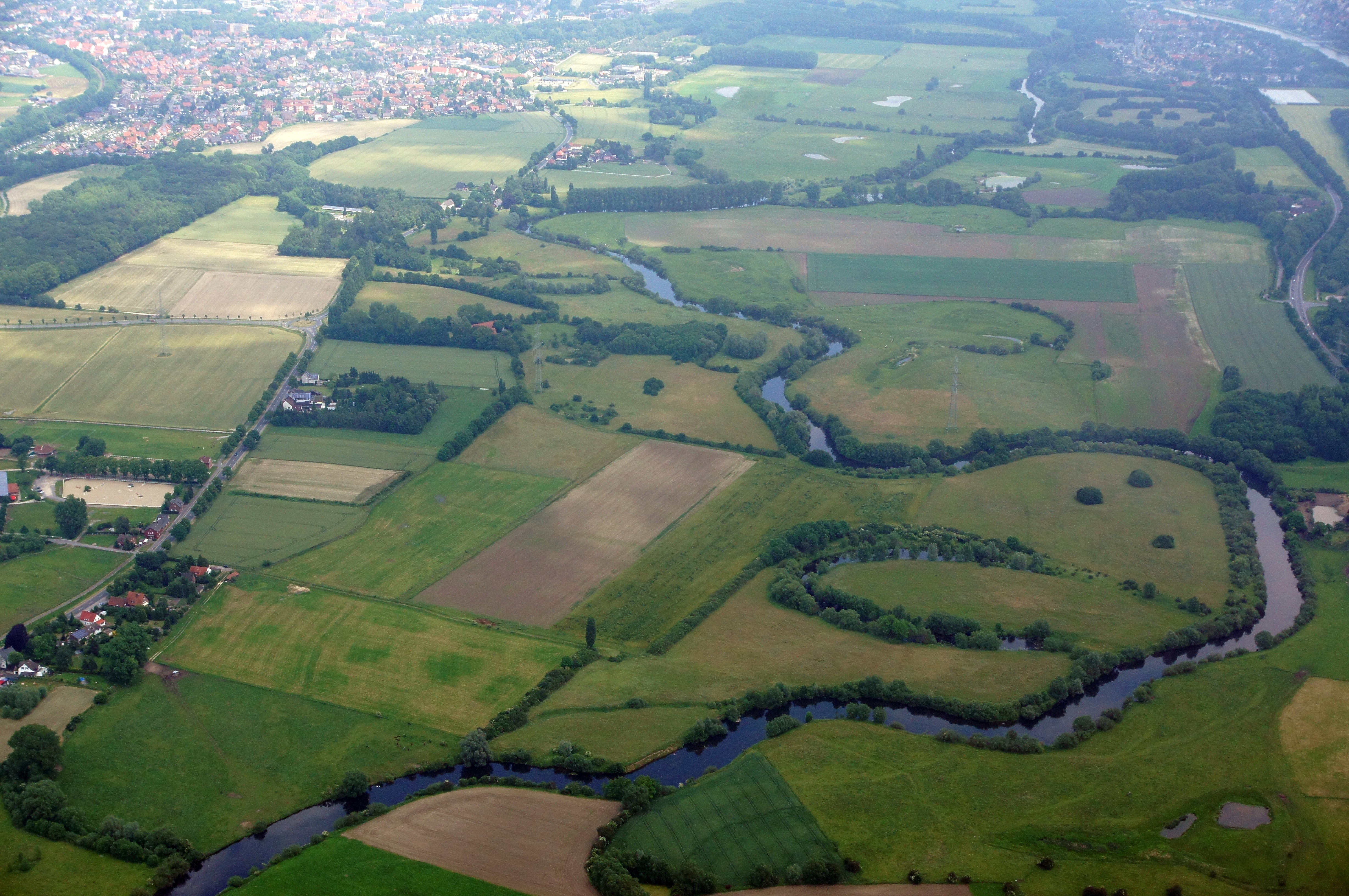 Die Flussaue der Lippe (NSG UN-055, Lippeaue von Werne bis Heil) bei Bergkamen, Kreis Unna, NRW. Die Lippe bildet hier die Gemeindegrenze zwischen den Städten Werne (nördlich des Flusses, im Bild links) und Bergkamen (südlich des Flusses, im Bild rechts). Das Bild entstand während des Münsterland-Fotoflugs am 1. Juni 2014. Hinweis: Die Aufnahme wurde aus dem Flugzeug durch eine Glasscheibe hindurch fotografiert.